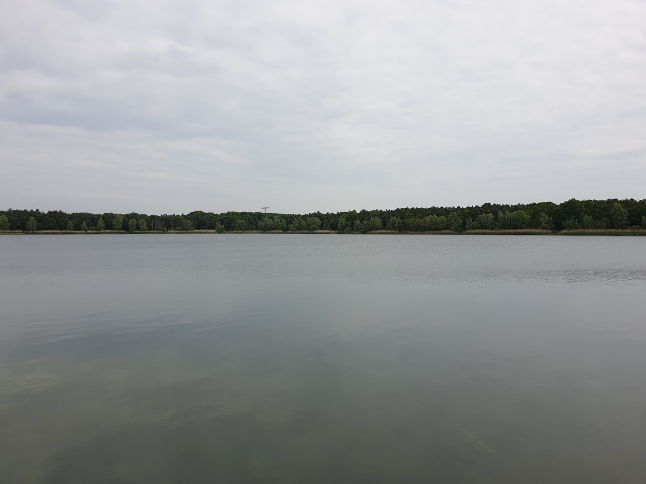 Afgraving het Gat van Waalre